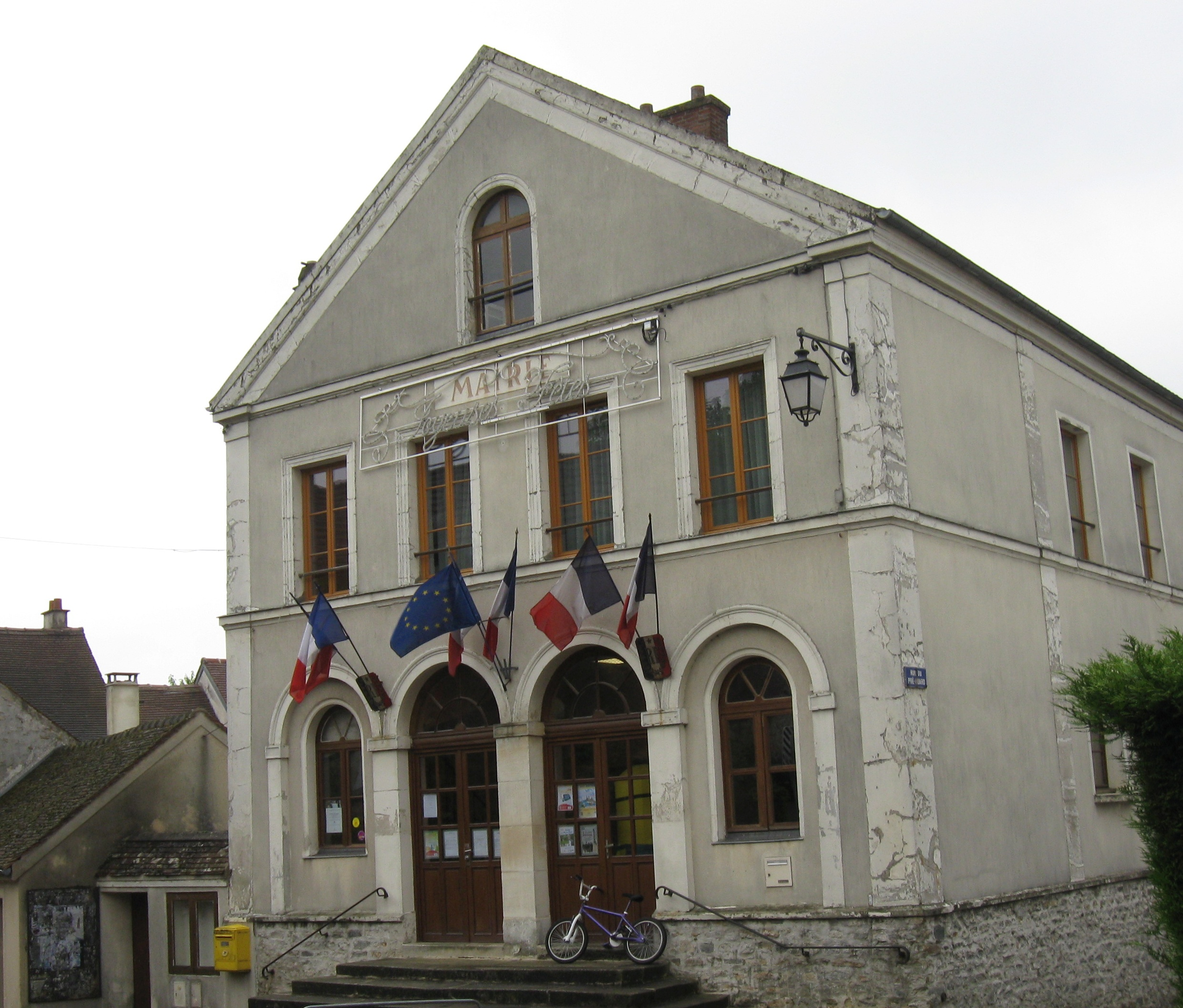 Mairie de Montgé-en-Goële. (Seine-et-Marne, région Île-de-France).